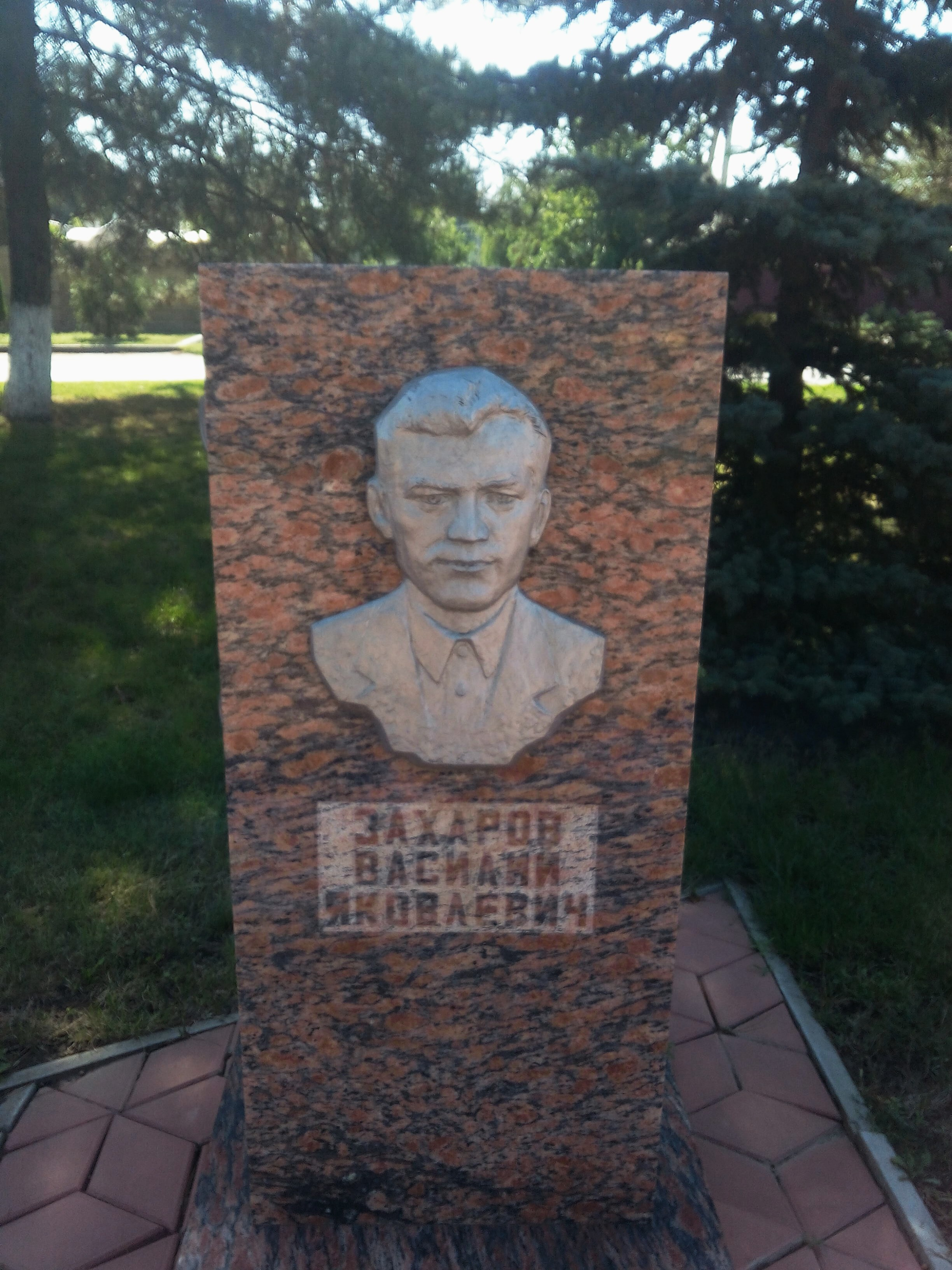 г. Сальск, пл. Свободы, Памятная стела с барельефом Захарова В.Я. на Аллее Героев